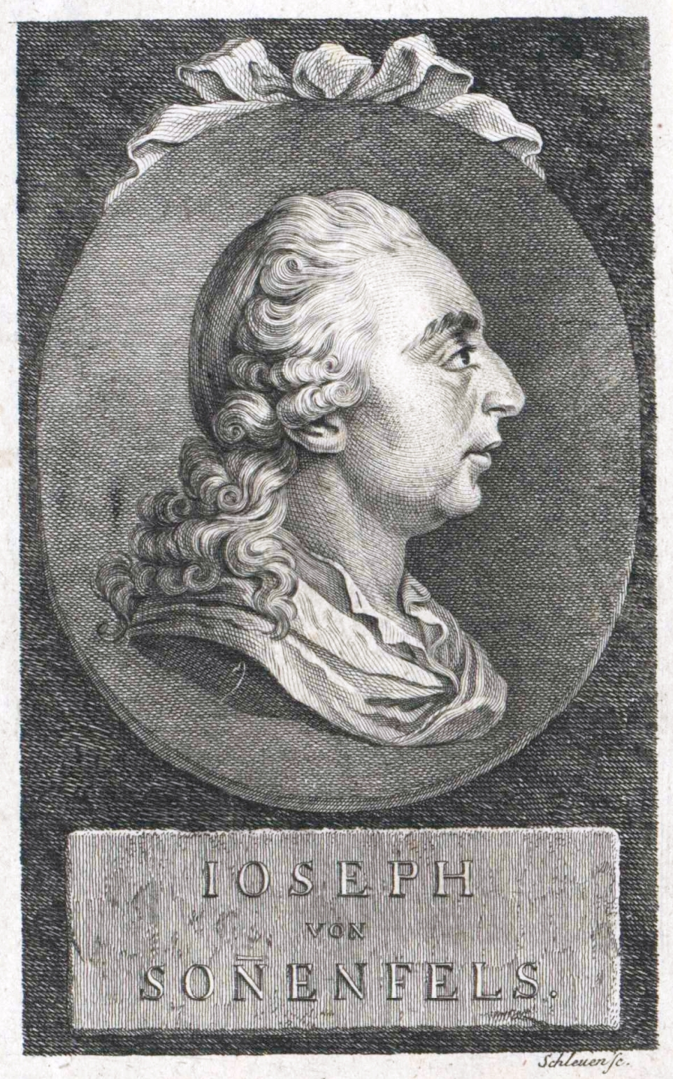 Joseph von Sonnenfels (1733-1817) austrian jurist